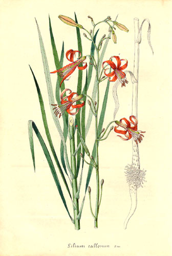 Lilium callosum Aus: Flore des serres et des jardins de l’Europe von Charles Lemaire und Anderen. Gent, Louis van Houtte, 1847, volume 3 (plate 230). Handcolorierte Lithographie